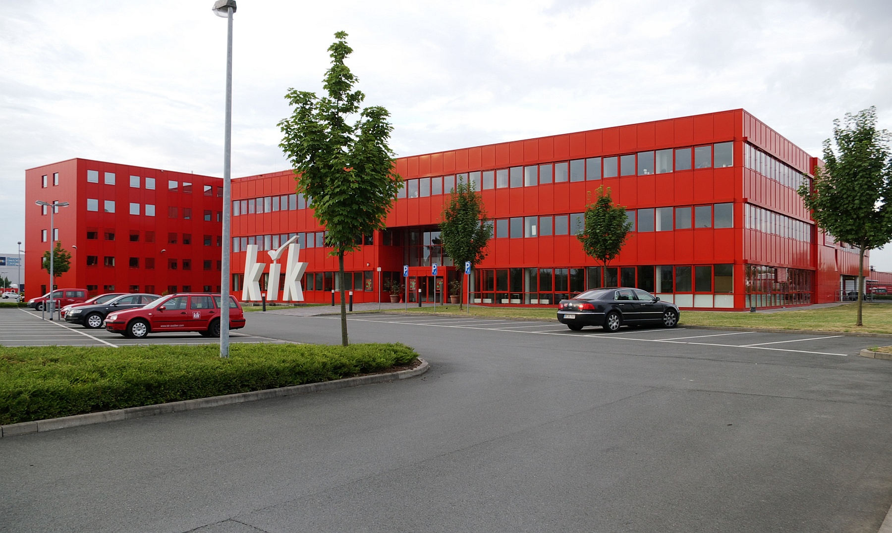 kik Hauptverwaltung in Bönen, Nordrhein-Westfalen